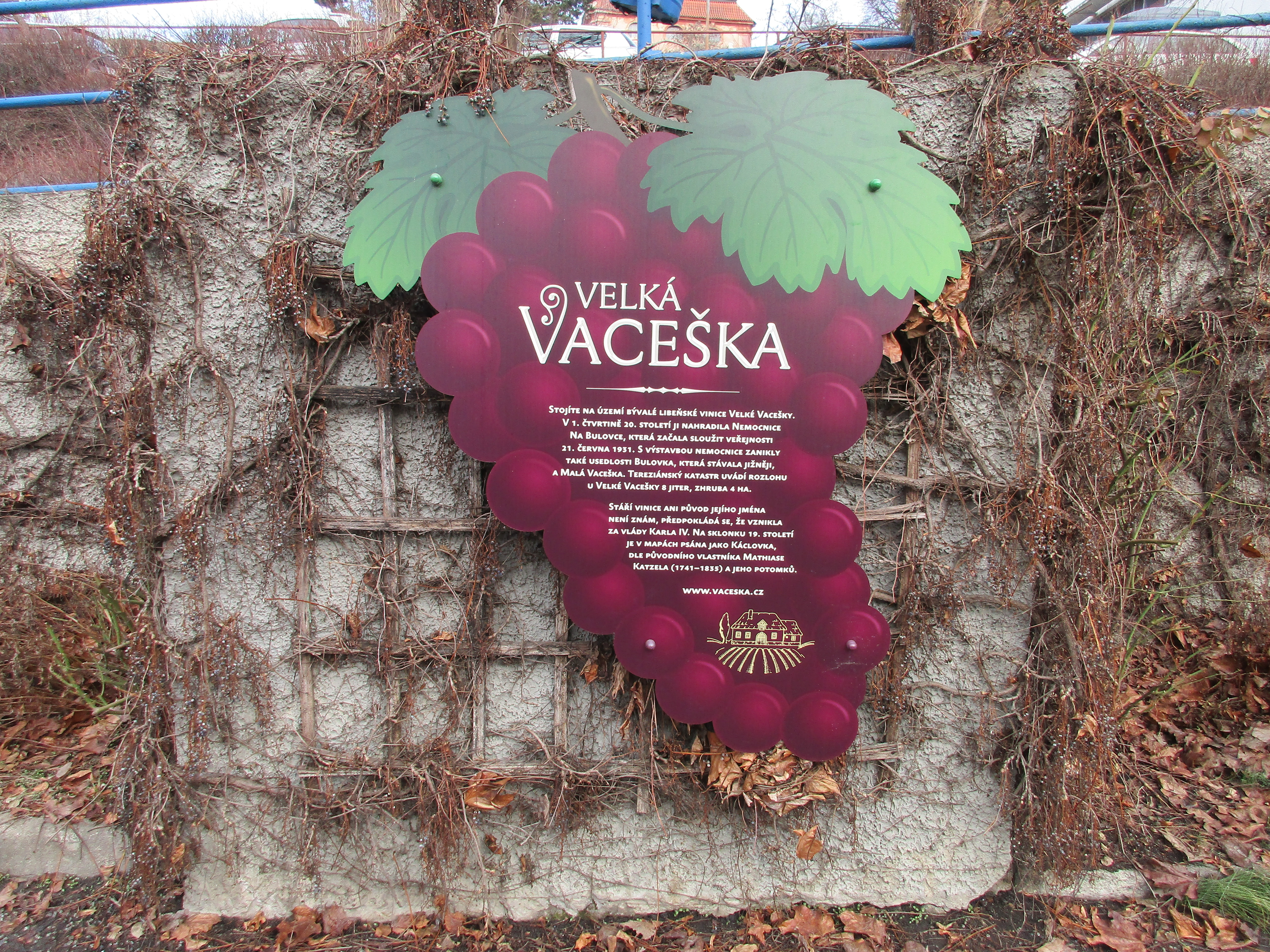 Vzpomínka na usedlost Velká Vaceška, která se nacházela v areálu nemocnice Na Bulovce.